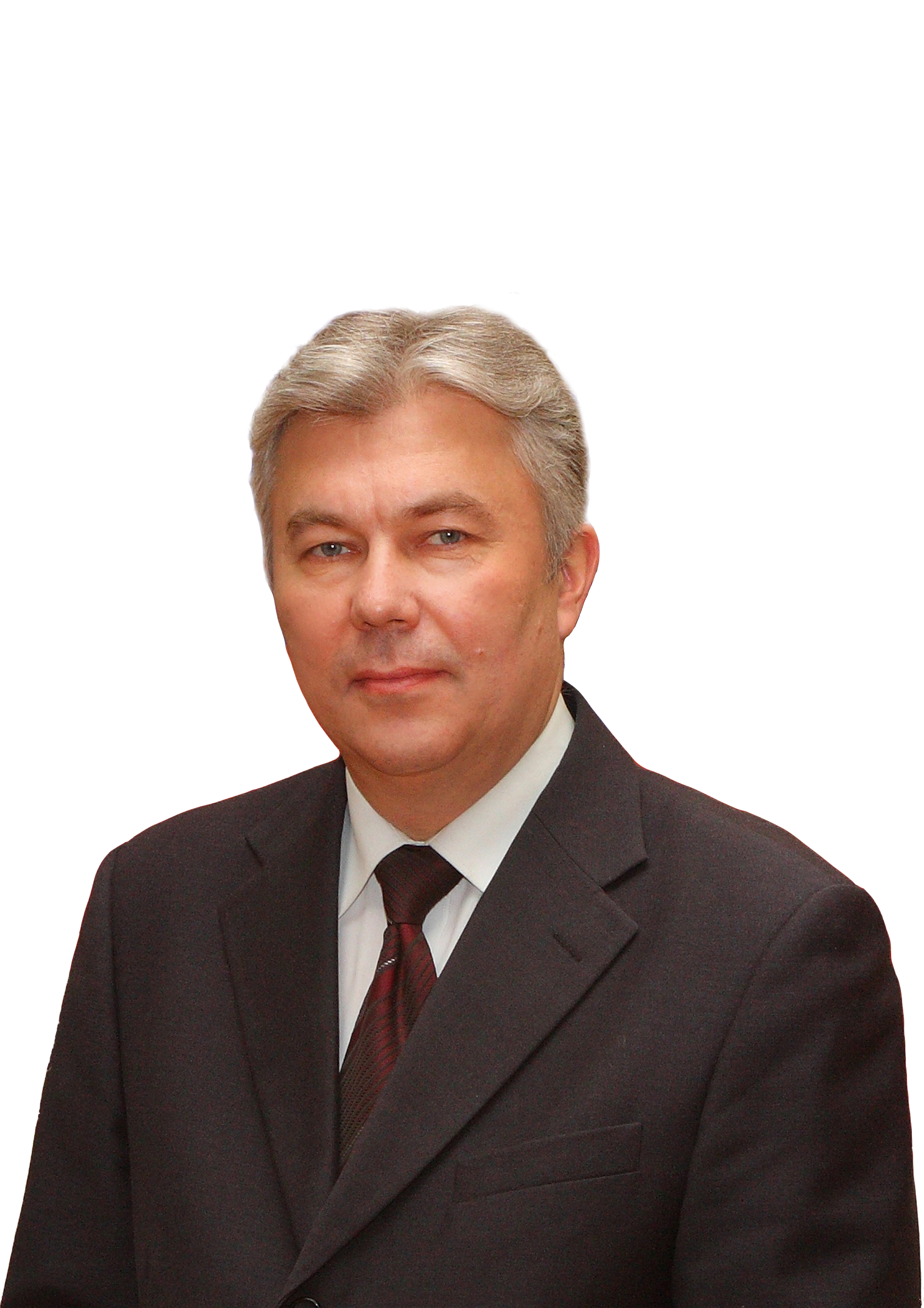 Фотография